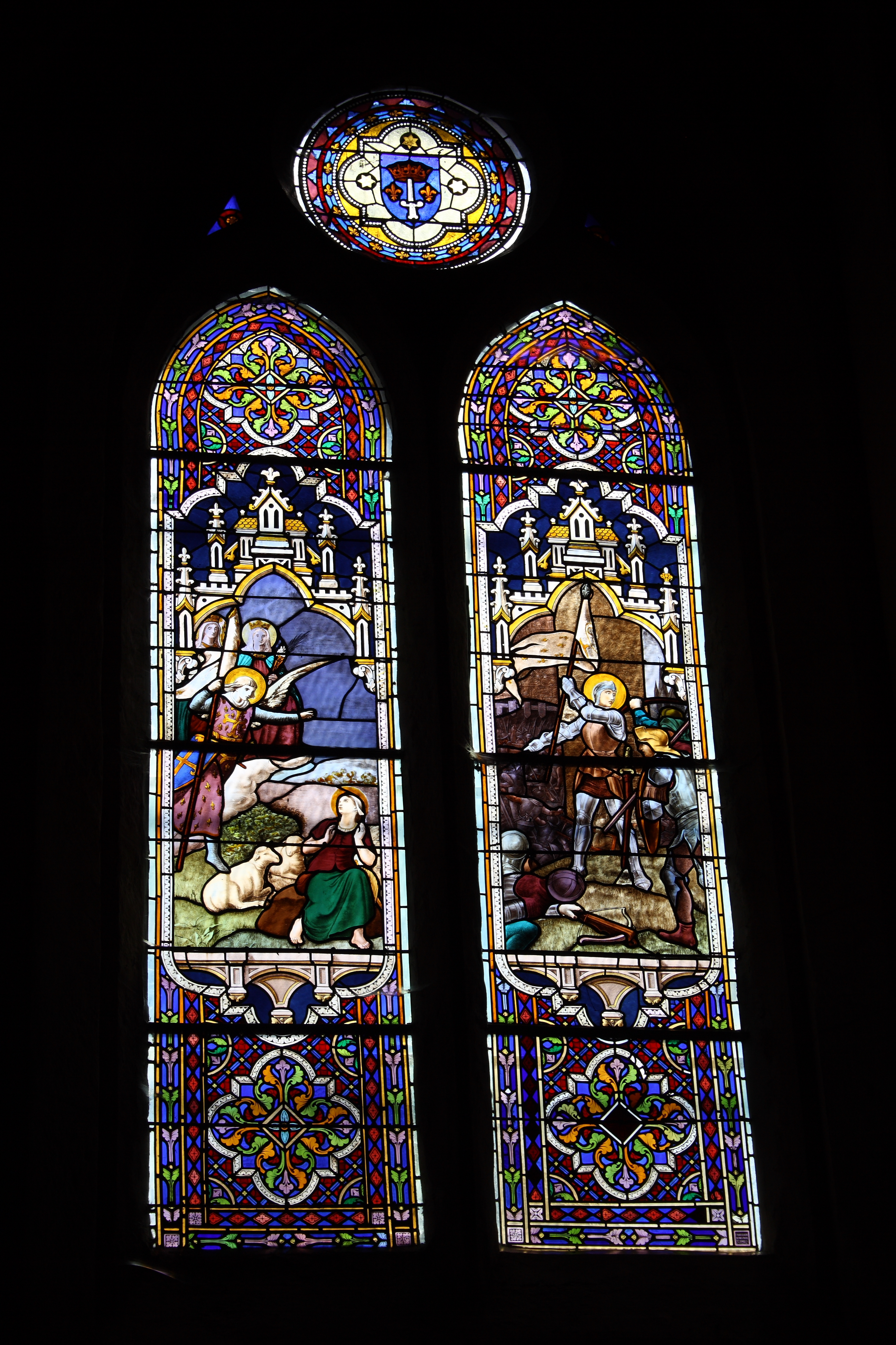 Bleiglasfenster in der Kirche Saint-Pierre-Saint-Paul in Jouy-sur-Morin im Département Seine-et-Marne (Île-de-France), Darstellung: Jeanne d'Arc